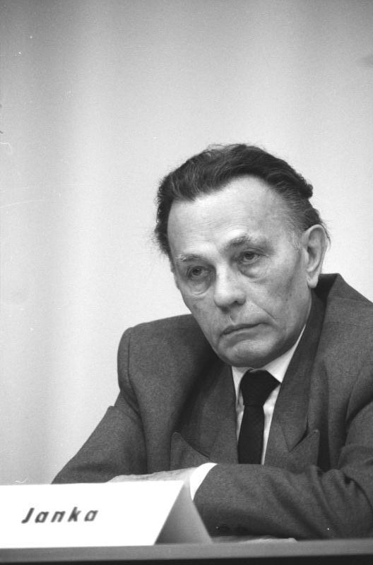 ADN-ZB/Senft/16.12.89 Berlin: Der Schriftsteller Walter Janka, der durch sein Buch "Schwierigkeiten mit der Wahrheit" gegenwärtig auch Jüngeren bekannt wird, war Gast auf dem außerordentlichen Parteitag der SED in der Dynamo-Halle. Janka, inzwischen rehabilitiert, war in den 50er Jahren Direktor des Aufbau-Verlages und in einem Schauprozeß zu einer mehrjährigen Haftstrafe verurteilt worden.